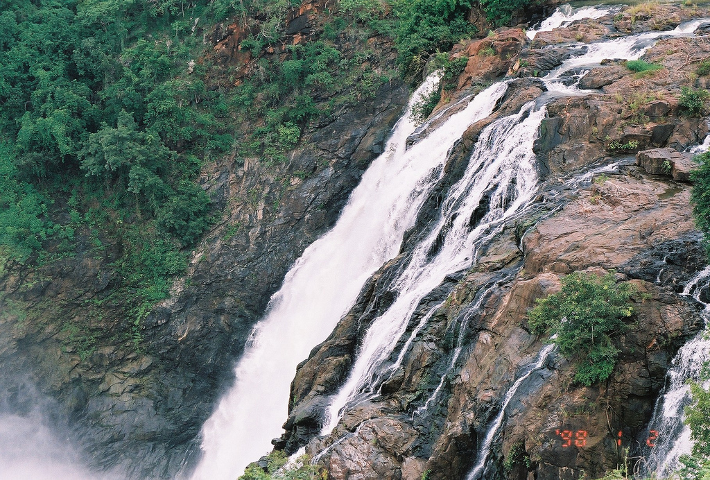 Shivanasamudra falls